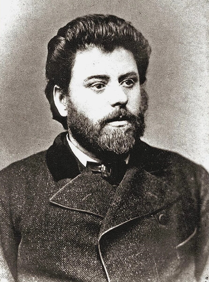 Ion Creangă. Fotografie făcută în ate­lierul Heck, din Iaşi, pe timpul răsboiului din 1877. Ea trebuie să corăspundă cu intrarea lui Creangă în „Junimea".